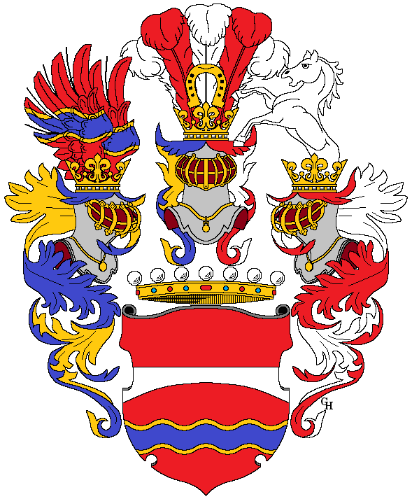 Wappen des österreichischen Beamten und Ministers für öffentliche Arbeiten Ottokar Trnka (1871–1919), verliehen anlässlich seiner Erhebung in den österreichischen Freiherrenstand mit dem Prädikat "von Laberon" 1916. Zeichnung von Gerd Hruška ( Für weitere Informationen zu dieser Standeserhebung siehe Arno Kerschbaumer, Nobilitierungen unter der Regentschaft Kaiser Franz Joseph I. / I. Ferenc József király (1914–1916), Graz 2017 (ISBN 978-3-9504153-2-2), S. 64, 276, 278 sowie (